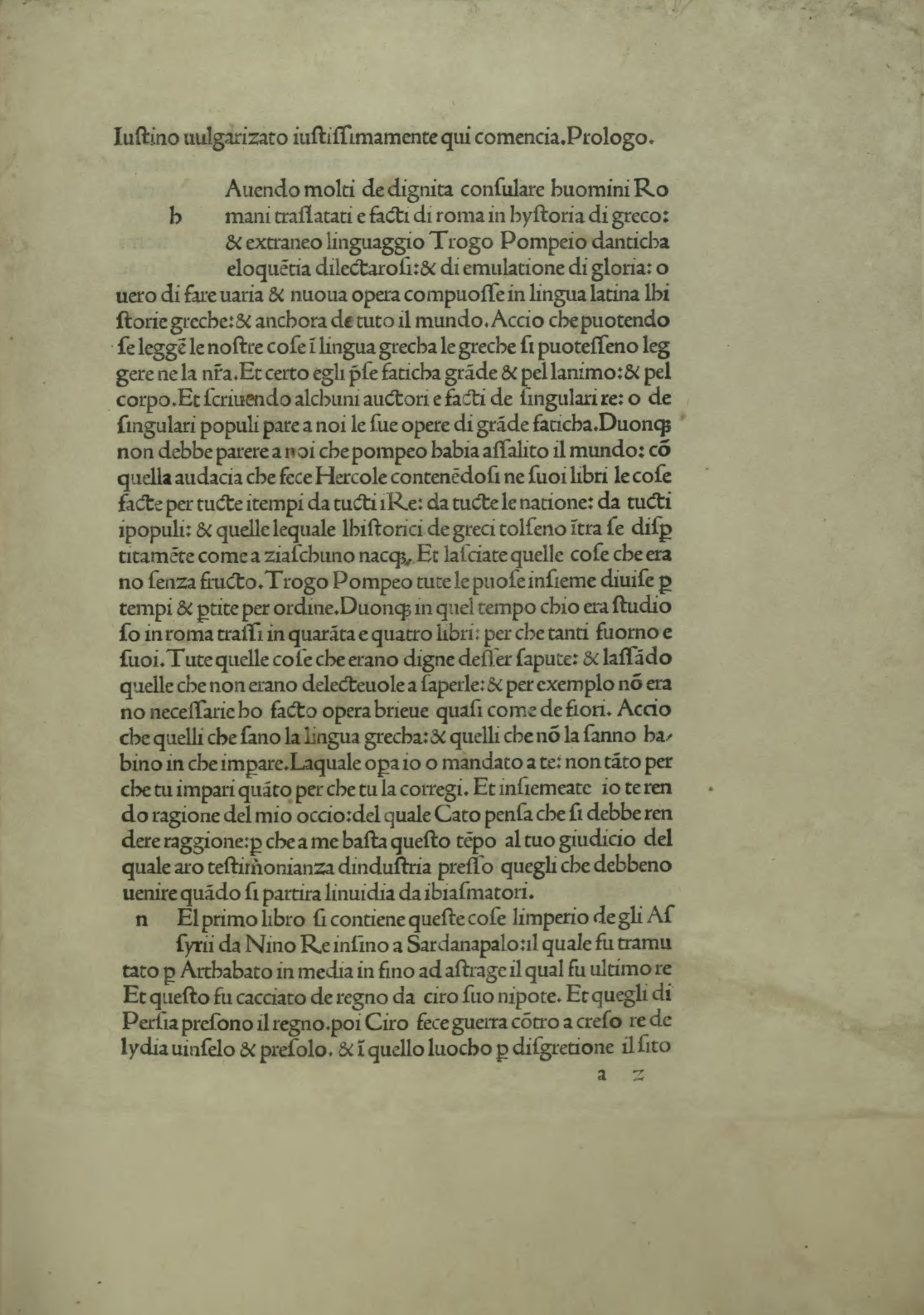 Epitome historiarum Trogi Pompeii (italiano). Segue: Girolamo Squarzafico: Epistola a Nicolò di Campobasso. - impresso ne lalma cidade de Venetia : ale spese di Iohanne da Colonia et Iohannem Gheretzem compagno, negli anni dil signore MCCCCLXXVII ali giorni X semptembris. - 124 c. ; a¹⁰, b-o⁸, p¹⁰ ; 4°. - Manca la c. a1 .